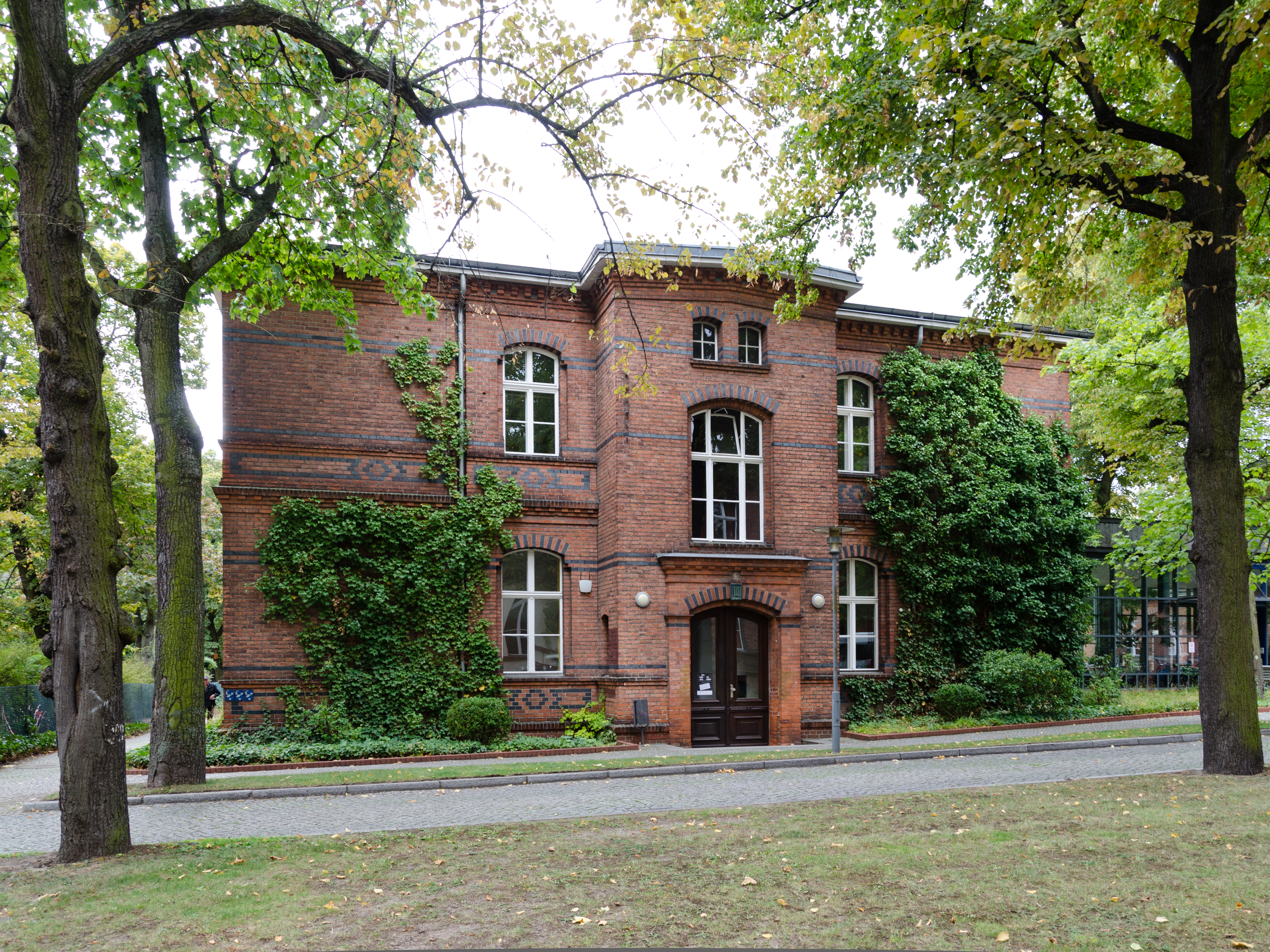 Reinickendorfer Straße 61–62, Kaiser- und Kaiserin-Friedrich-Kinderkrankenhaus, Pavillons für Infektionskrankheiten, 1911–12 von Heino Schmieden und Julius BoethkThis is a photograph of an architectural monument.